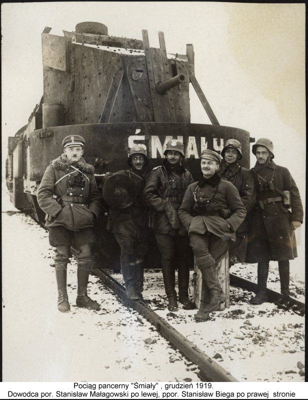 Pociąg pancerny (armored train) Smiały